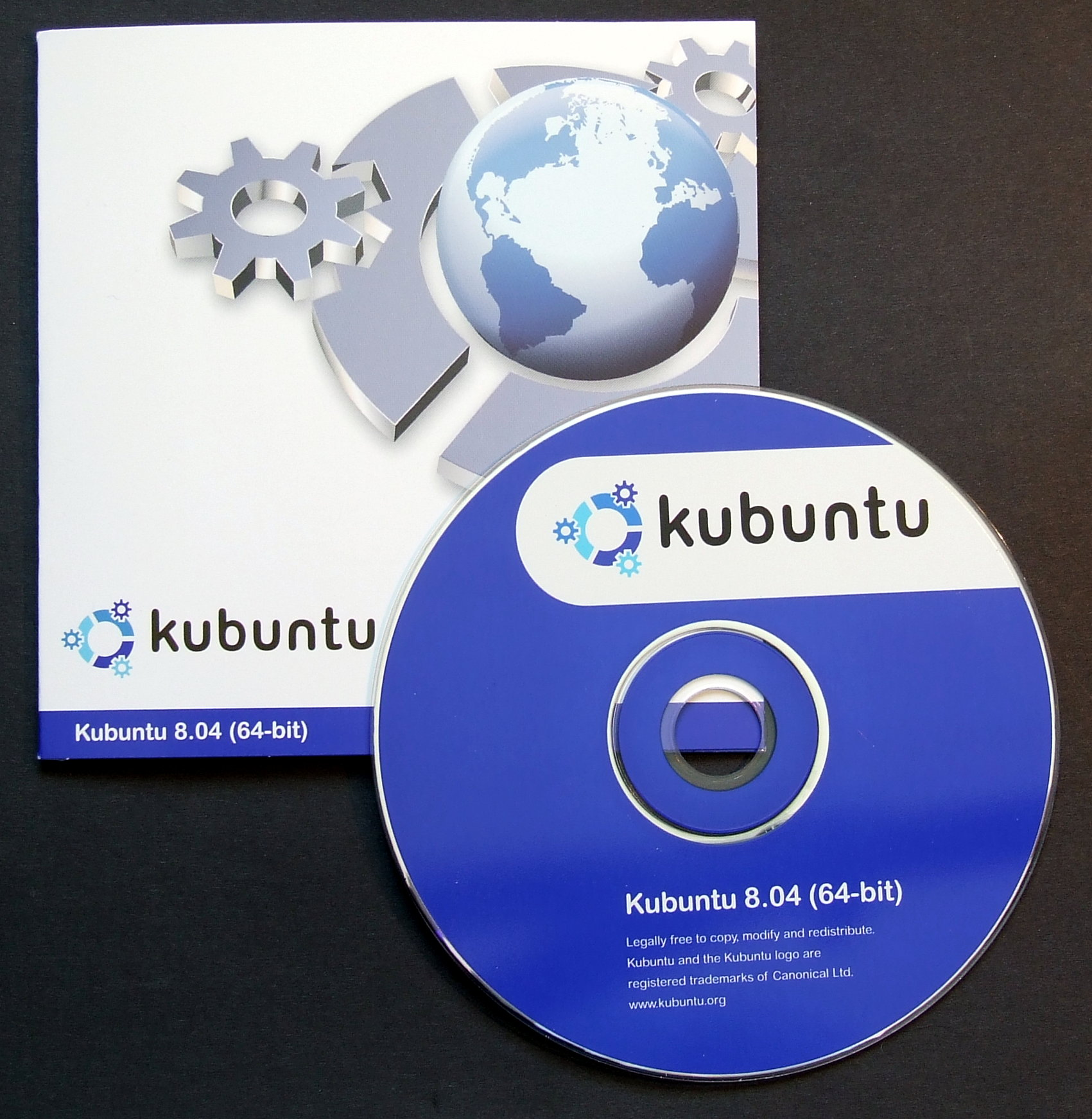 Licensing: This image or multimedia was created by Bartosz Senderek. The image or audio is licensed under CC-BY license. Attribution to me is required. Licencja: Ten obrazek lub plik multimedialny został stworzony przez Barotsza Senderka. Został on udostępniony na licencji CC-BY. Informacja o moim autorstwie jest wymagana. "I want to use the image/multimedia. How can I do that?" You can use this image/multimedia freely for any purpose, including commercial use, provided that you license it under the above license. My suggestion is to use text shown below: If you use the image I would appreciate it if you would let me know on my talk page, but this is not required as long as you follow the above license. "Chcę użyć tego pliku. Jak mogę to zrobić?" Możesz używać tej grafiki/multimediów darmowo w każdym celu, włączając użycie komercyjne, udostępniając go dalej na powyższej licencji. Jeśli zdecydujesz się na publikację zdjęcia mojego autorstwa obowiązkowo podpisz go w sposób podany w sekcji "Licensing text". Jeżeli użyłeś mojego pliku możesz powiadomić mnie o tym na mojej stronie dyskusji, lecz nie jest to wymagane, dopóki trzymasz się powyższej licencji.